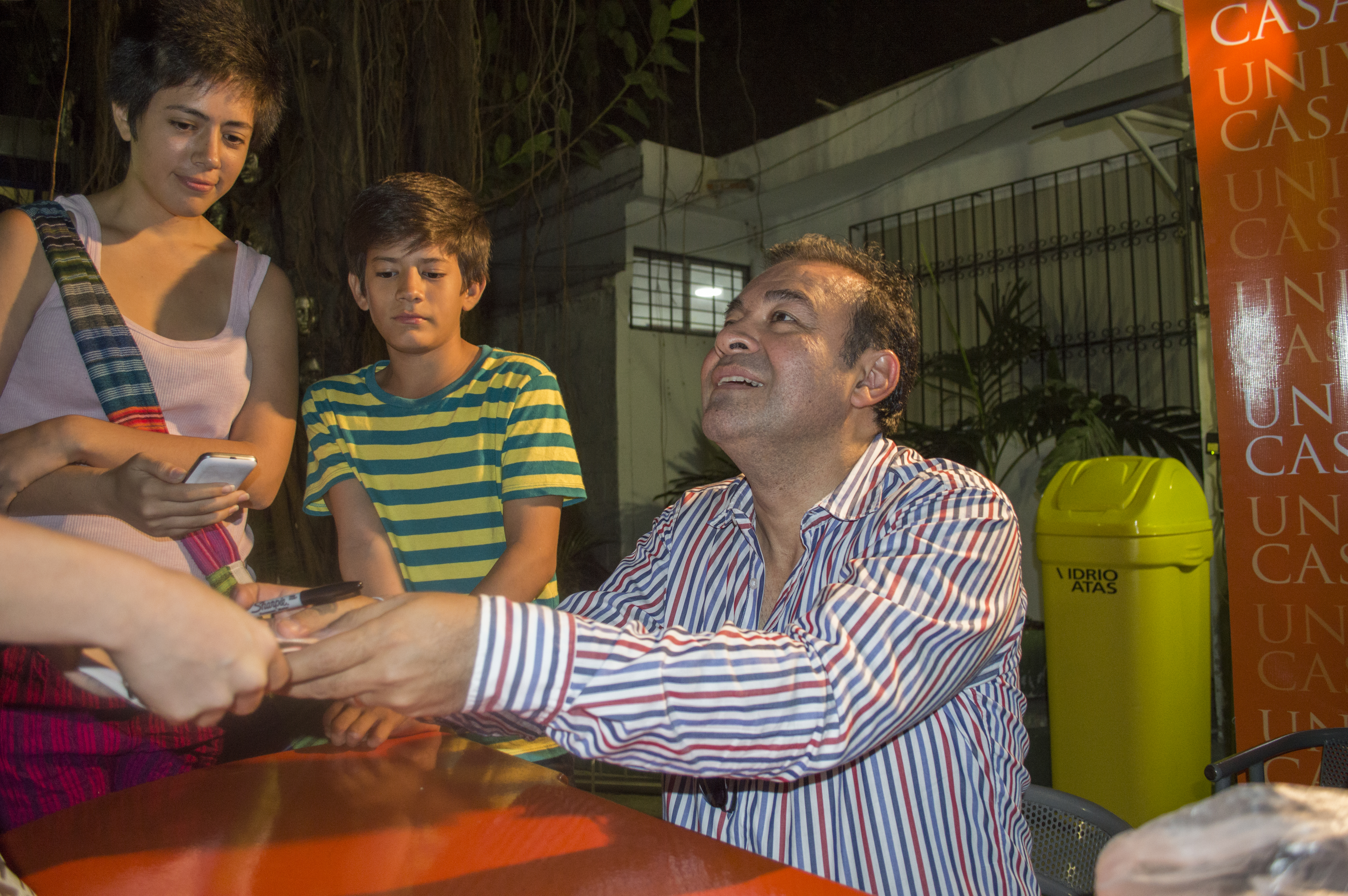 Mario Castañeda en la Universidad Casa Grande de Guayaquil, Ecuador, firmando autógrafos en 2015.